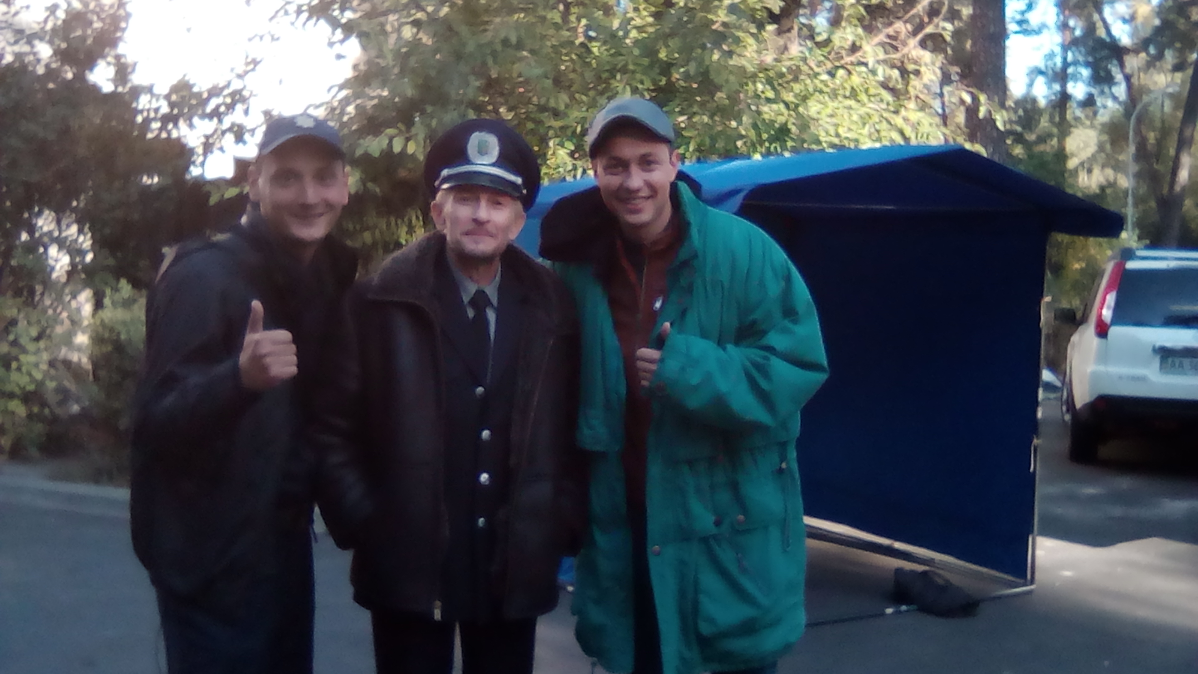 Съёмки